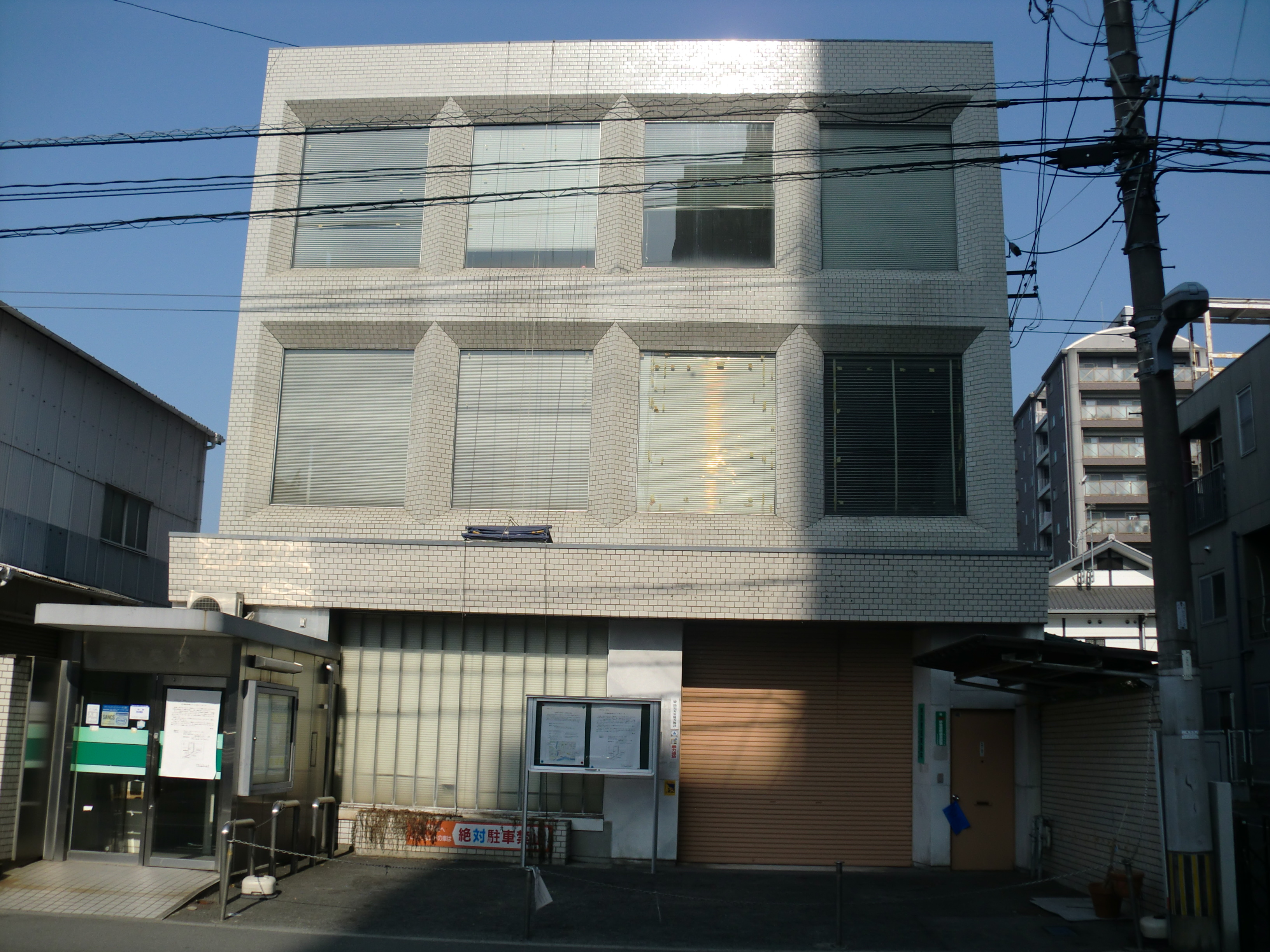 熊本市にある九州幸銀（きゅうしゅうこうぎん）信用組合熊本支店旧店舗